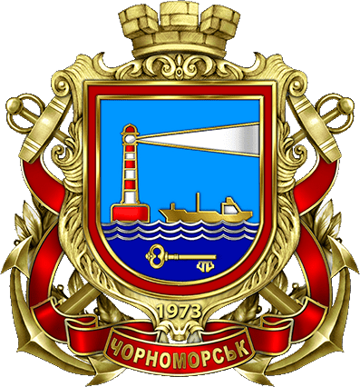 Герб м. Чорноморськ, Одеська область